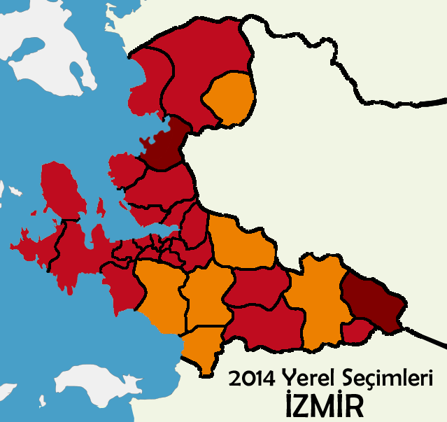 2014 seçim sonuçlarının ilçeler bazındaki bilgisini gösteren dosya.